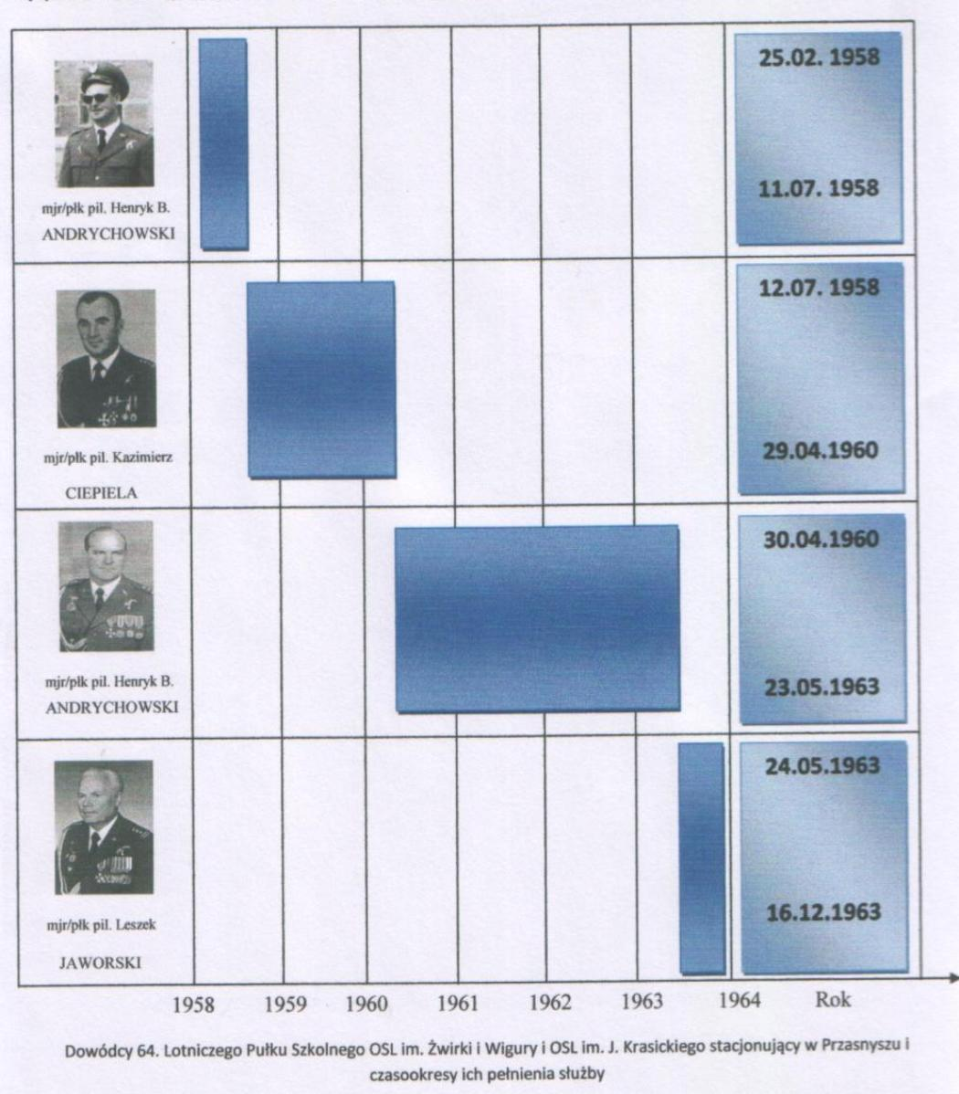 Dowódcy Garnizonu Przasnysz, czasokres pełnienia służby z lat 1958 - 1963